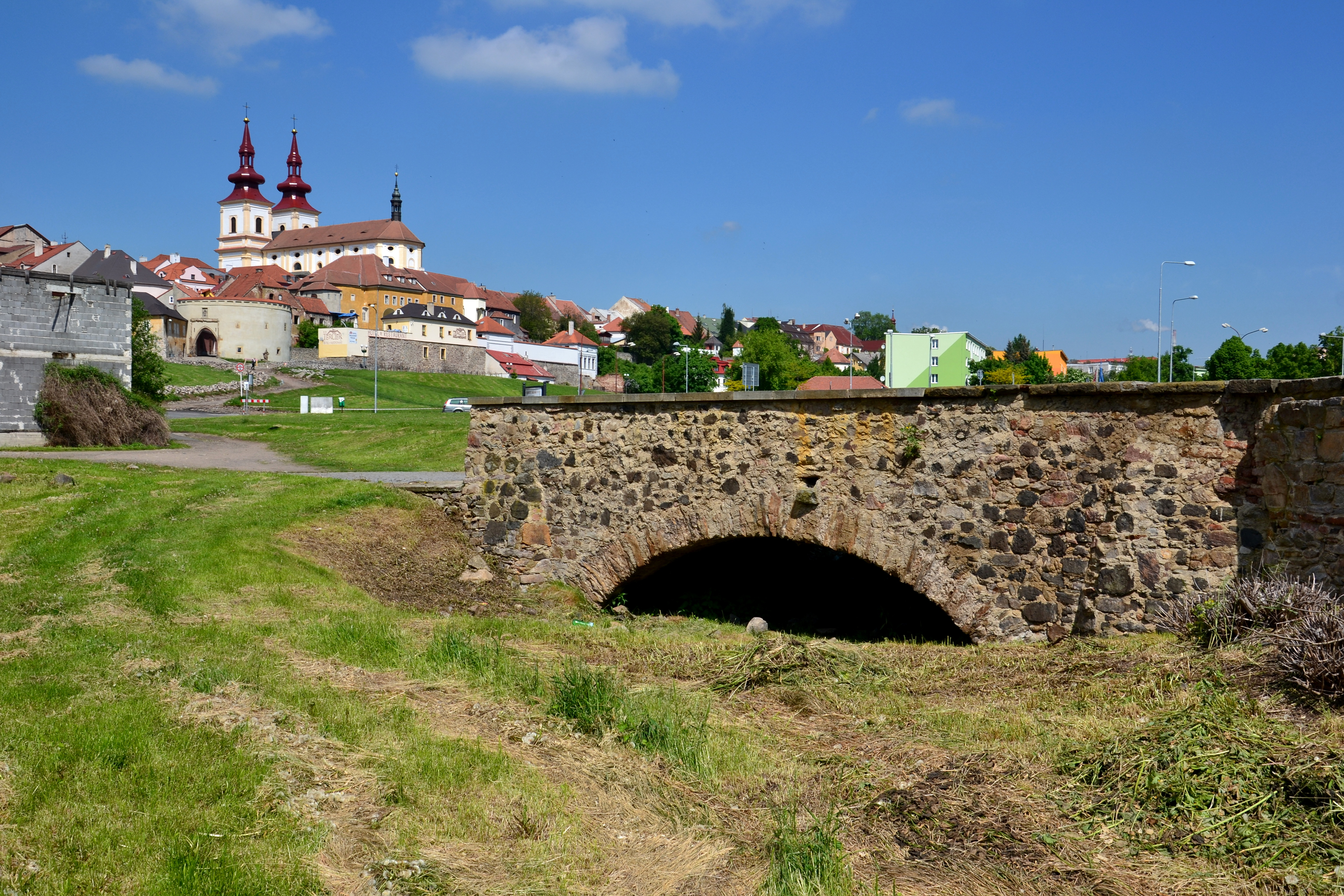 Bystřický můstek, Žatecká, Kadaň